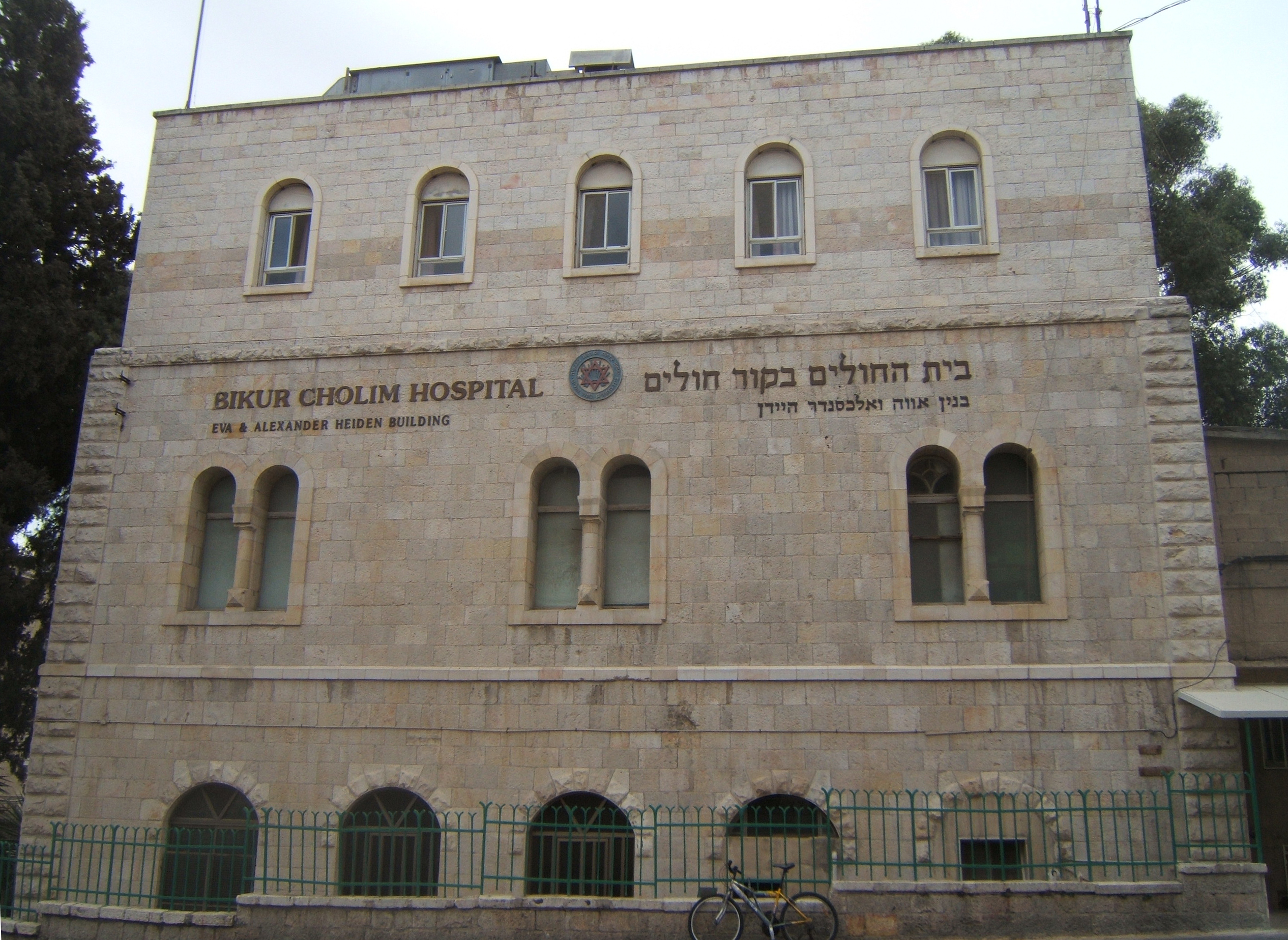 Bikur Cholim Hospital, Jerusalem